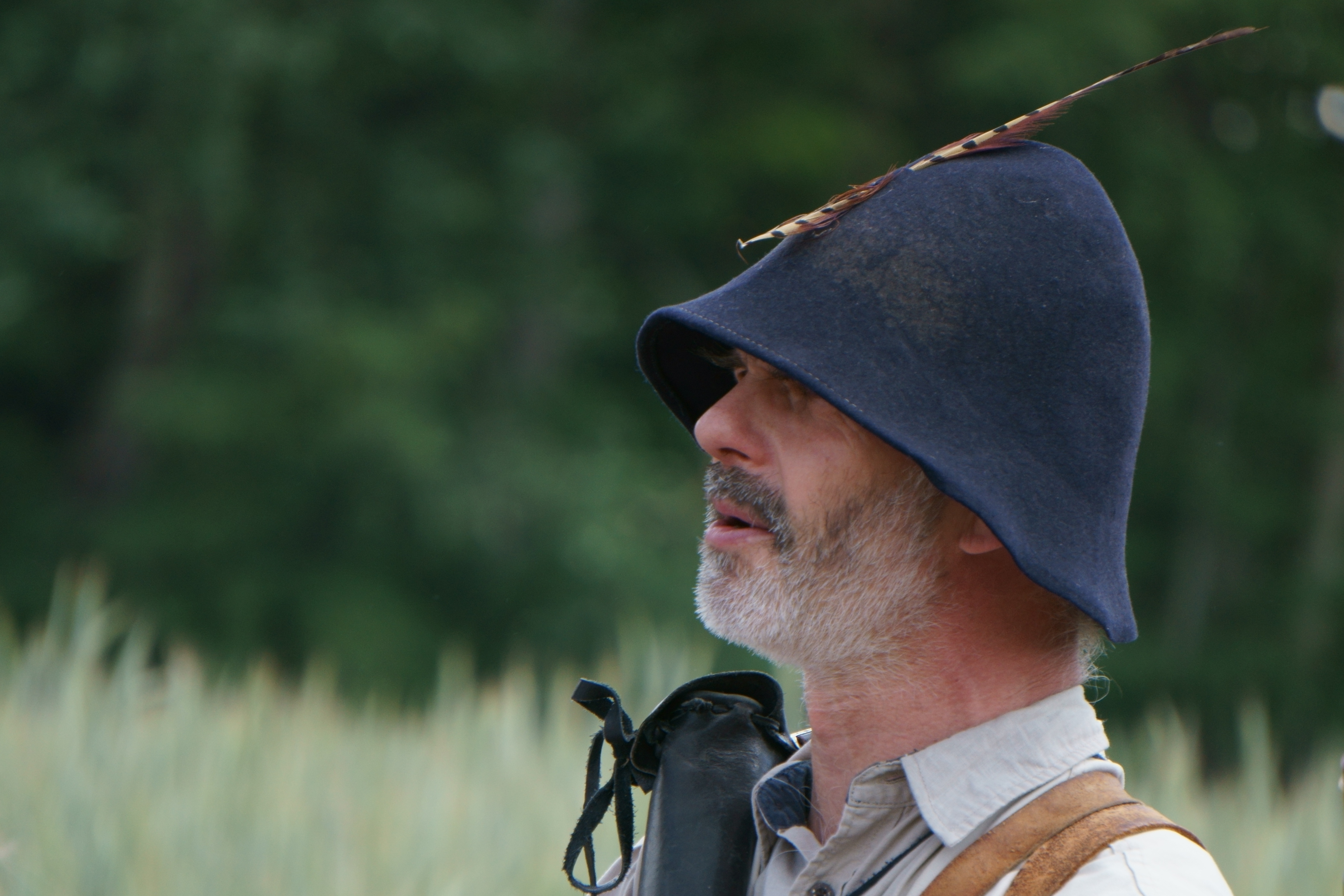 Letařovice - Pouť mezi dvěma Jány 2018 - Michael Pospíšil